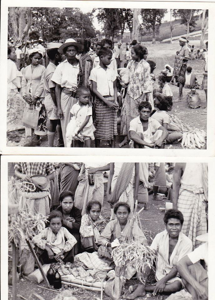 No Bazar